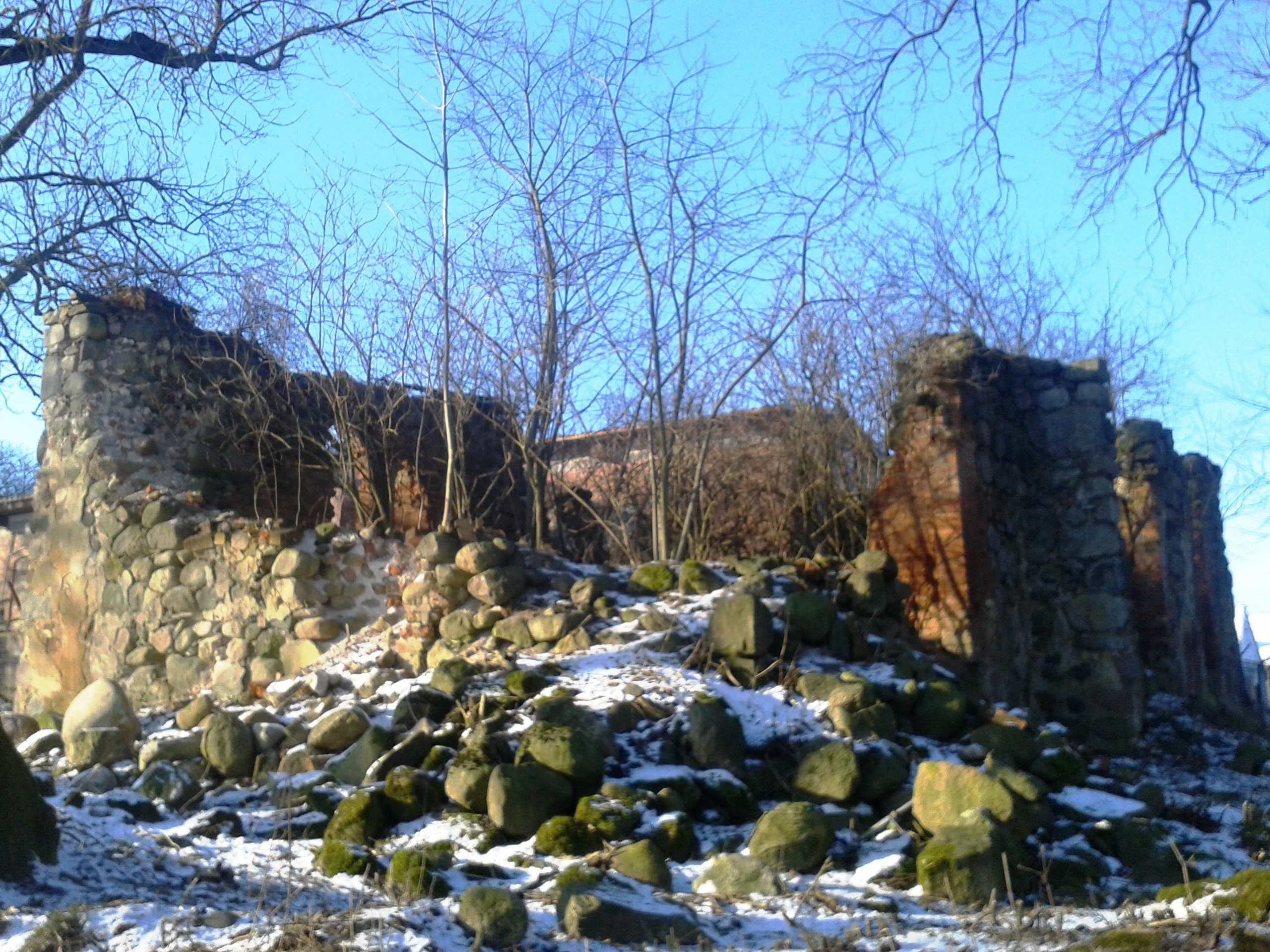 Czachowo (Gmina Radowo Małe), ruiny kościoła